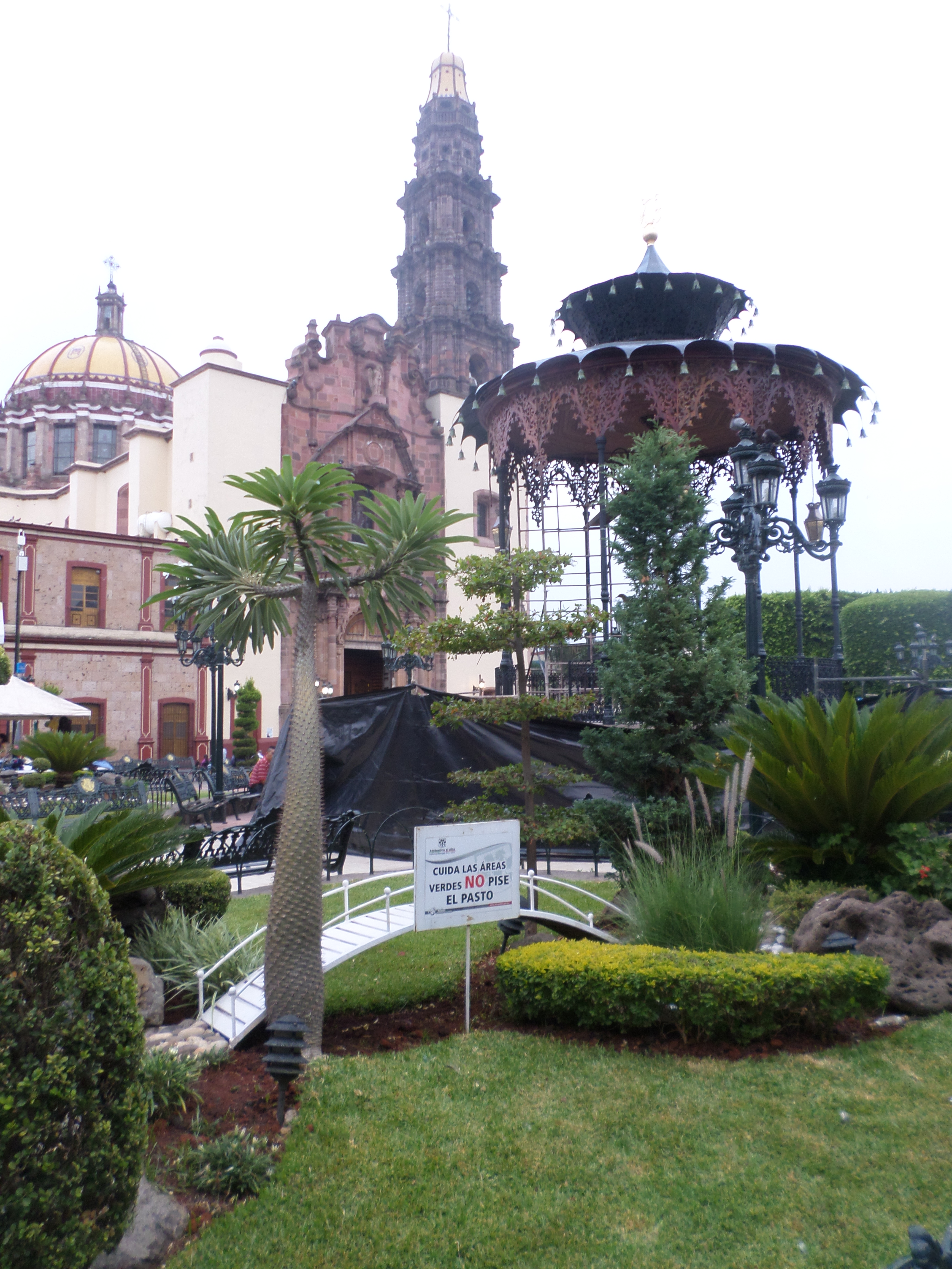 Centro, 47750 Atotonilco el Alto, Jal., Mexico